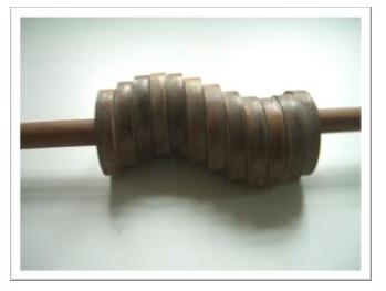 Nockenwelle aus der Eitz'schen Wellenmaschine